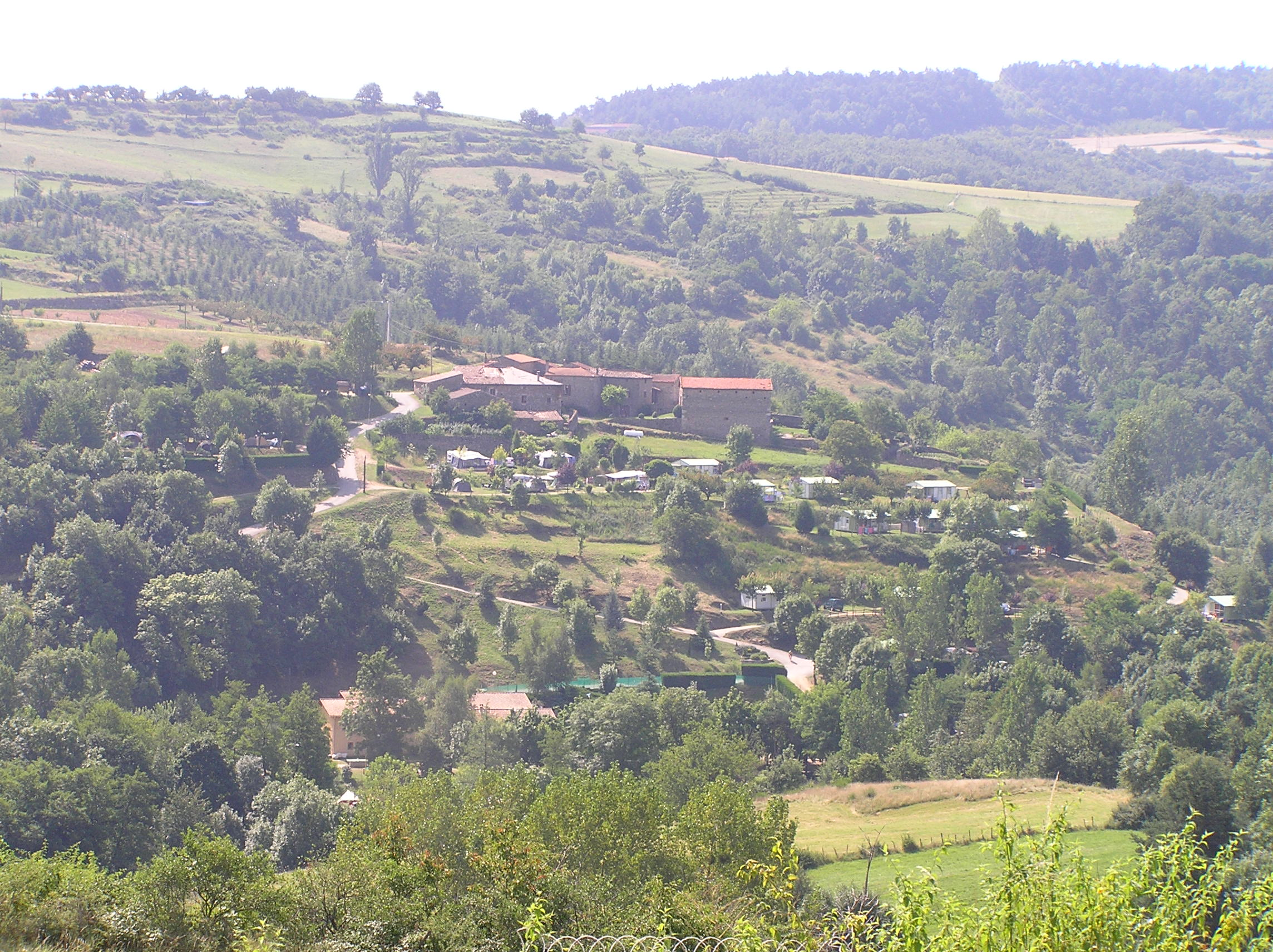 Le Petit Chaléat, commune d'Eclassan.